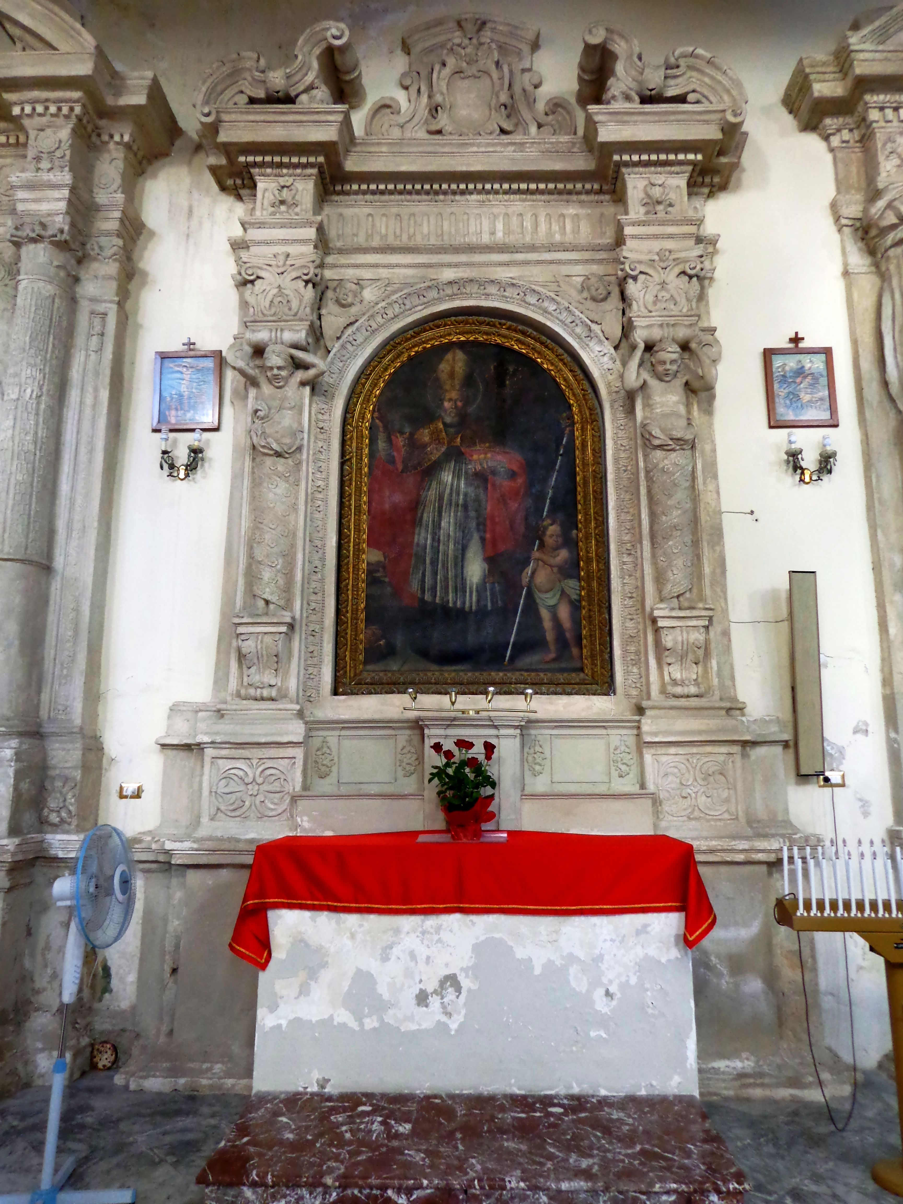 Duomo Condrò altare uno